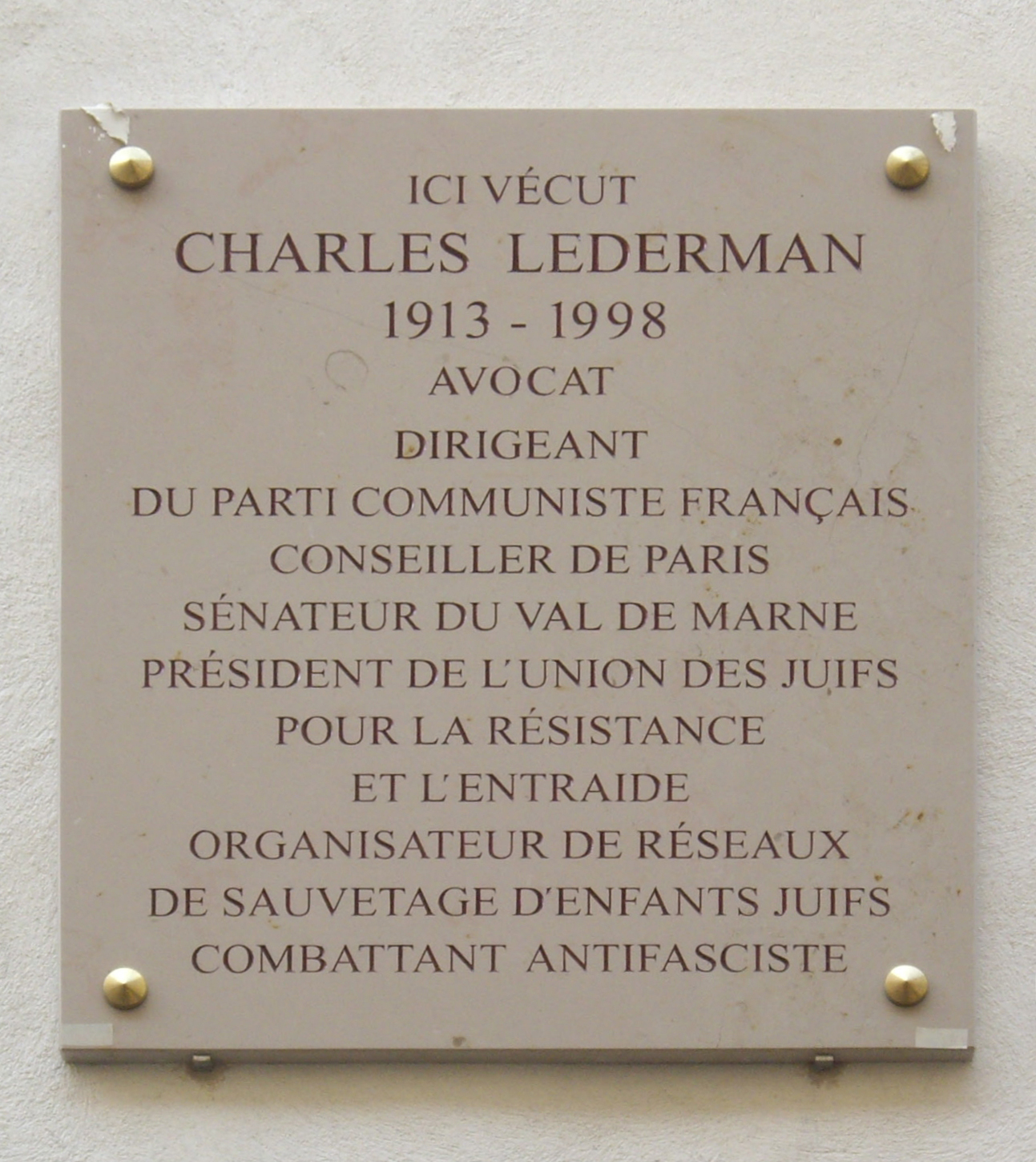 Plaque apposée au n° 4 de la rue Saint-Louis-en-l'Île, Paris 4e. « Ici vécut Charles Lederman, 1913-1998, avocat, dirigeant du Parti communiste français, conseiller de Paris, sénateur du Val-de-Marne, président de l'Union des juifs pour la résistance et l'entraide, organisateur de réseaux de sauvetage d'enfants juifs, combattant antifasciste. »